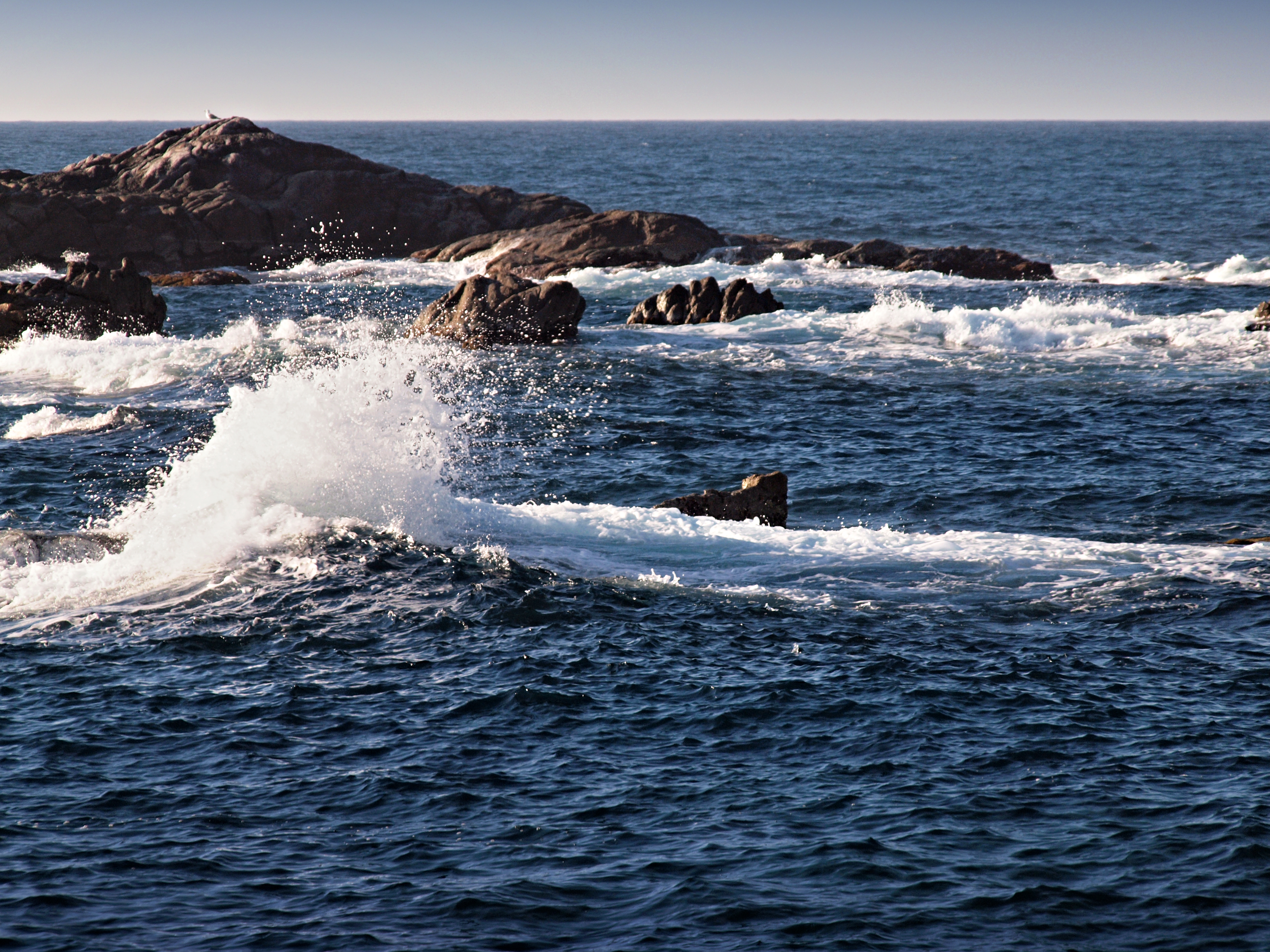 Lumio (Corse) - Îlots de Spano